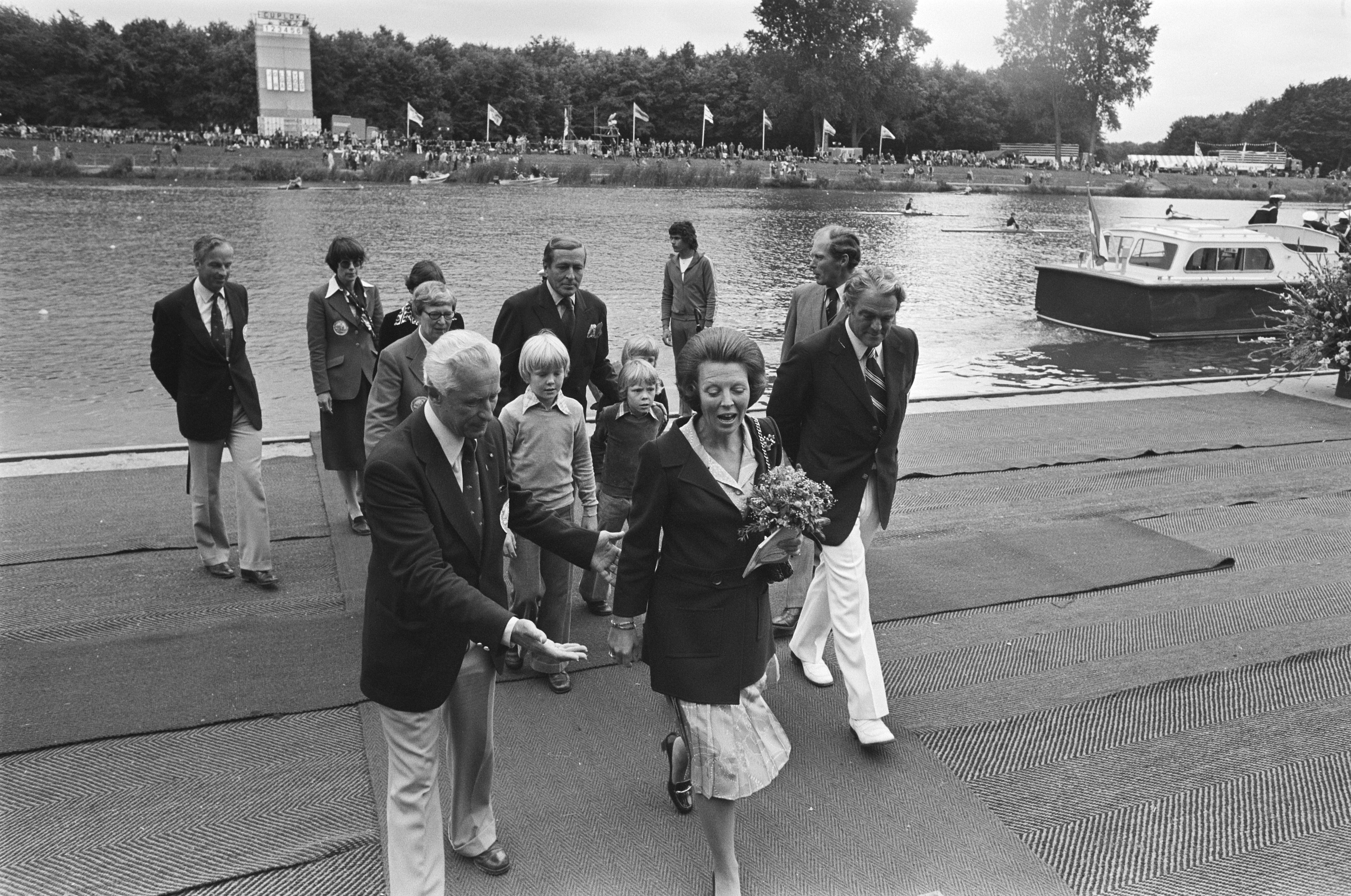 Collectie / Archief : Fotocollectie Anefo Reportage / Serie : [ onbekend ] Beschrijving : WK roeien Bosbaan; Prinses Beatrix , Claus en kind Datum : 28 augustus 1977 Trefwoorden : ROEIEN Persoonsnaam : Beatrix, prinses, Claus, prins Fotograaf : Verhoeff, Bert / Anefo Auteursrechthebbende : Nationaal Archief Materiaalsoort : Negatief (zwart/wit) Nummer archiefinventaris : bekijk toegang 2.24.01.05 Bestanddeelnummer : 929-3251